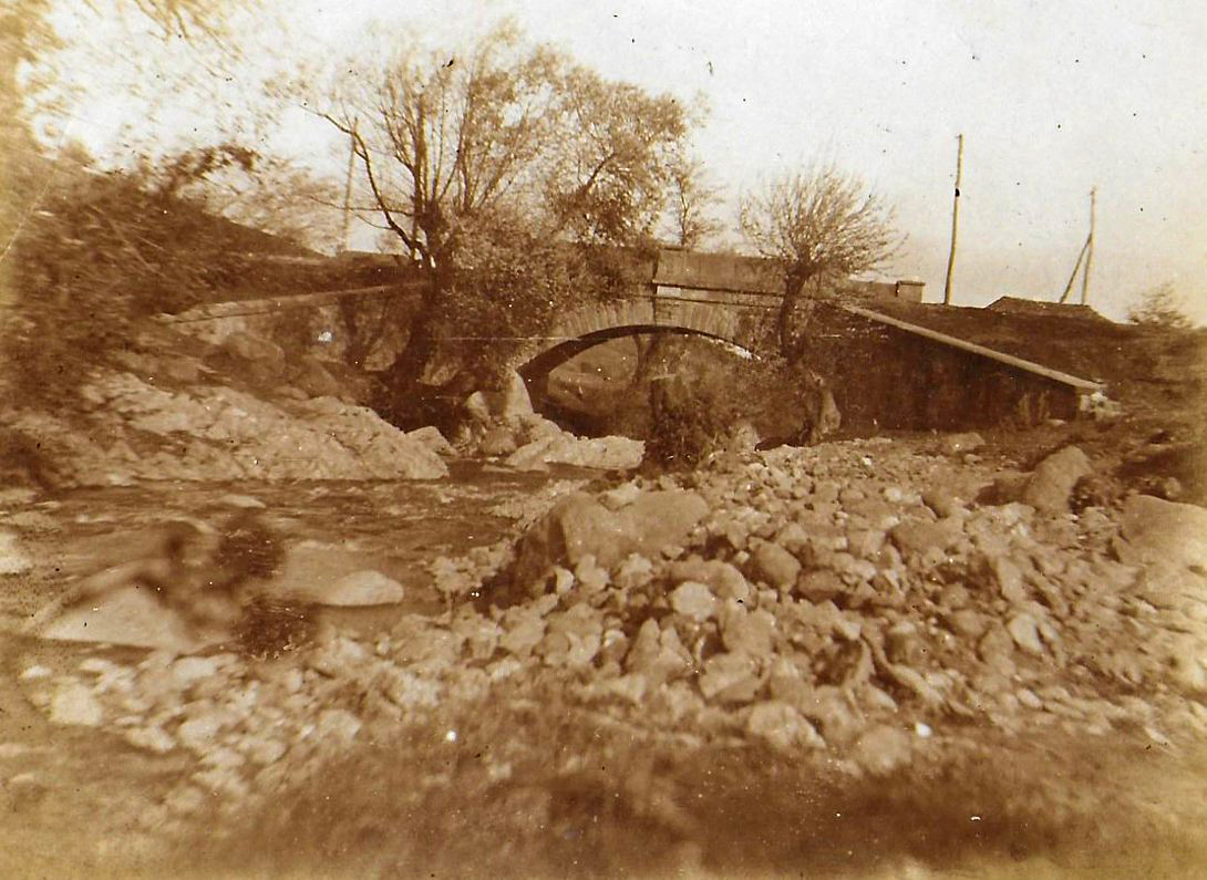 Снимка на моста от източната страна в края на 20-те, началото на 30-те години на 20-ти век